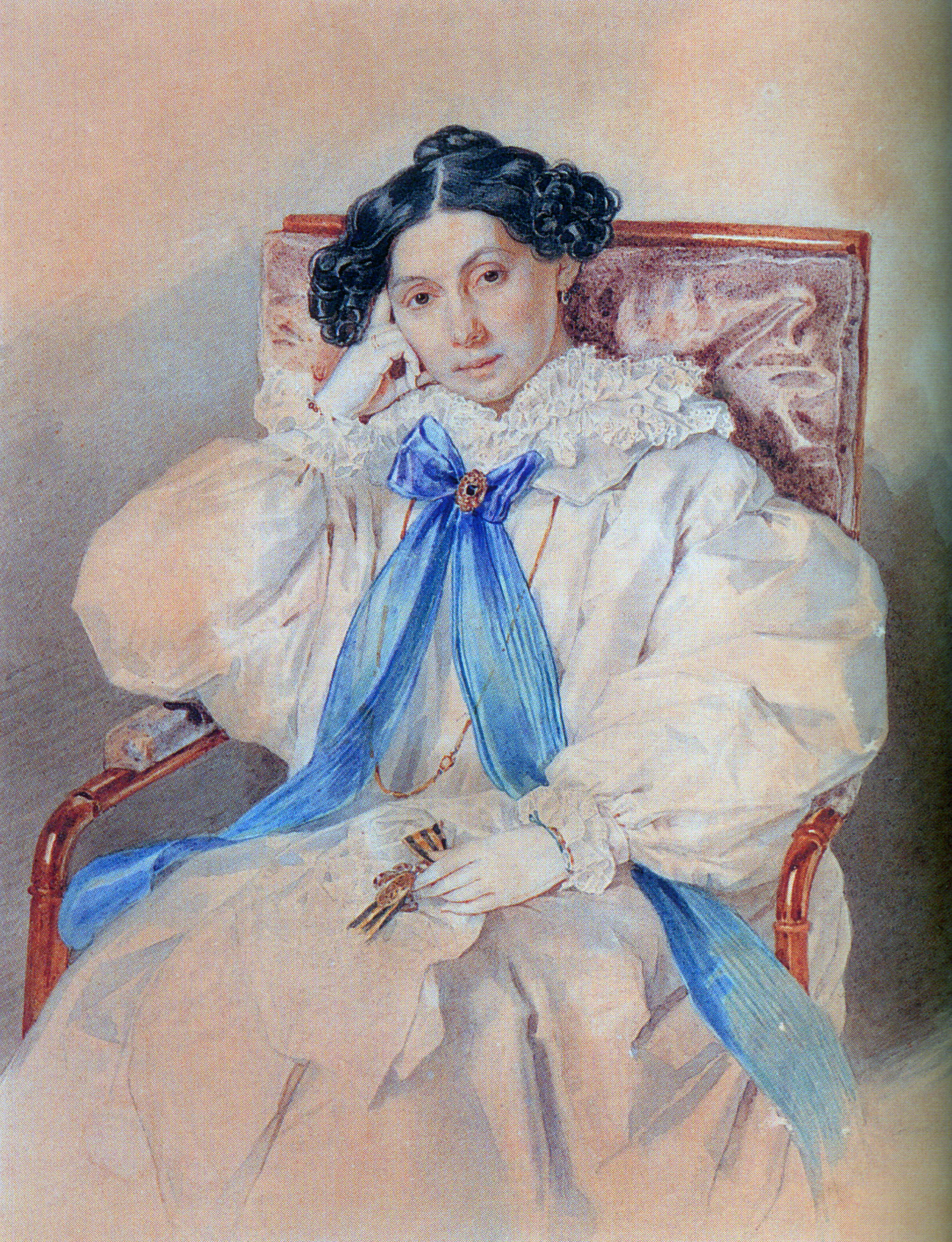 П.Ф.Соколов. Портрет Е.М.Хитрово. 1838. Бристольский картон, акварель, лак. Государственный музей А.С.Пушкина Елизавета Михайловна Хитрово, урожденная Кутузова (1783–1839), дочь М.И.Голенищева-Кутузова, в первом браке за графом Ф.И.Тизенгаузеном, во втором — за Н.Ф.Хитрово, русским поверенным в делах во Флоренции